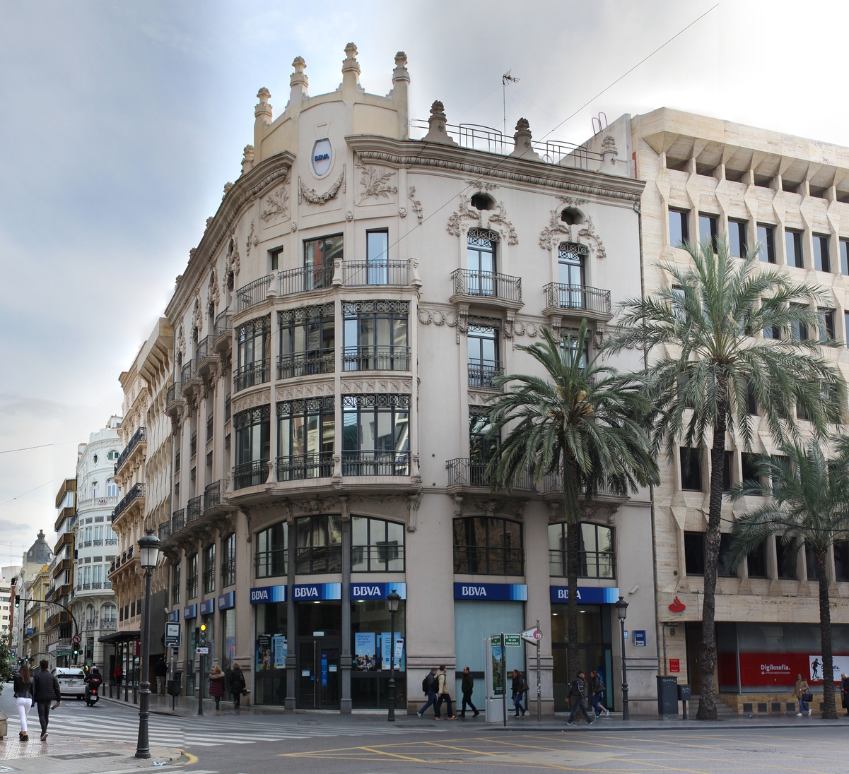 Casa Tarín de Vicente Rodríguez Martín (1911) en Valencia